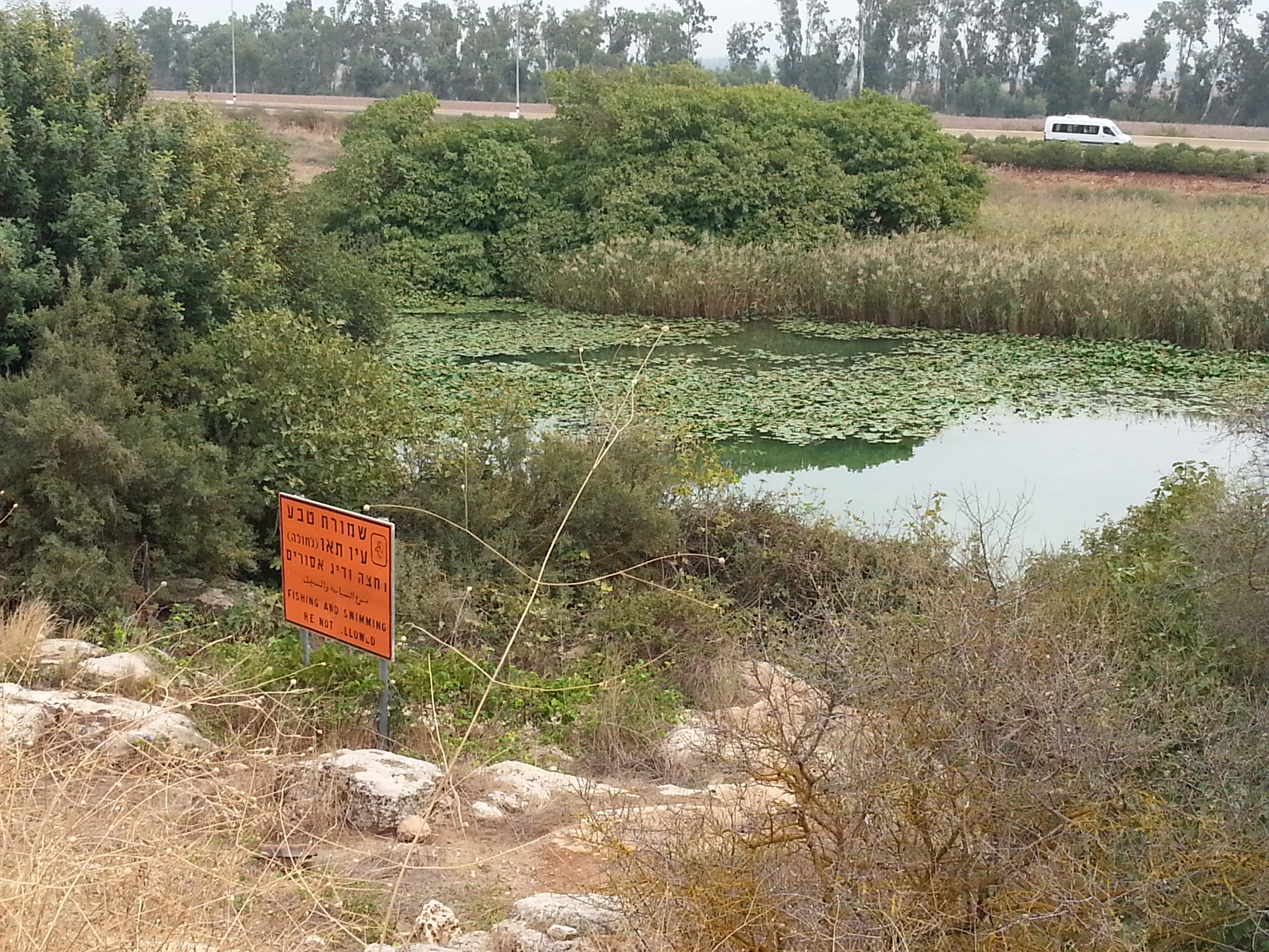 תל תאו תמונת המעין הצמוד לתל